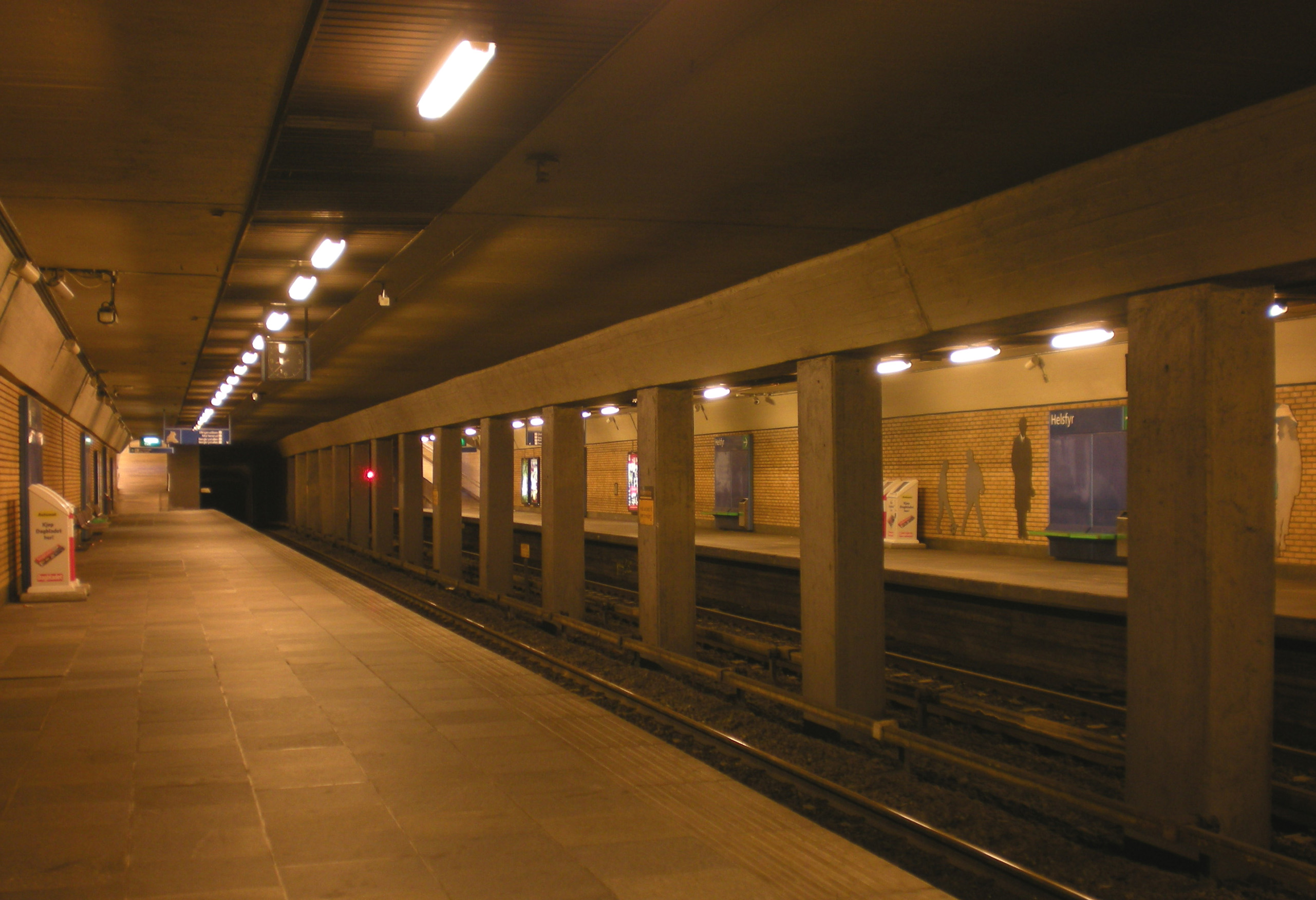 Dette er Helsfyr t-banestasjon. Plattformen er i retning fra Oslo sentrum.